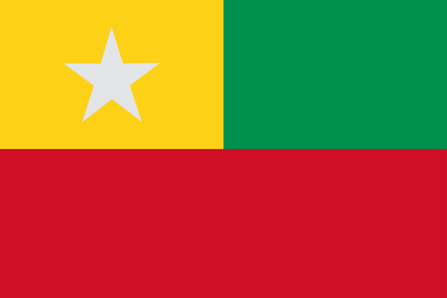 Bandera del Cantón Junín